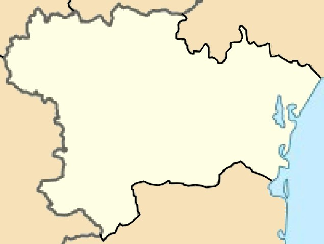 Carte 11 Aude Administrative Modèle:Géolocalisation/Aude